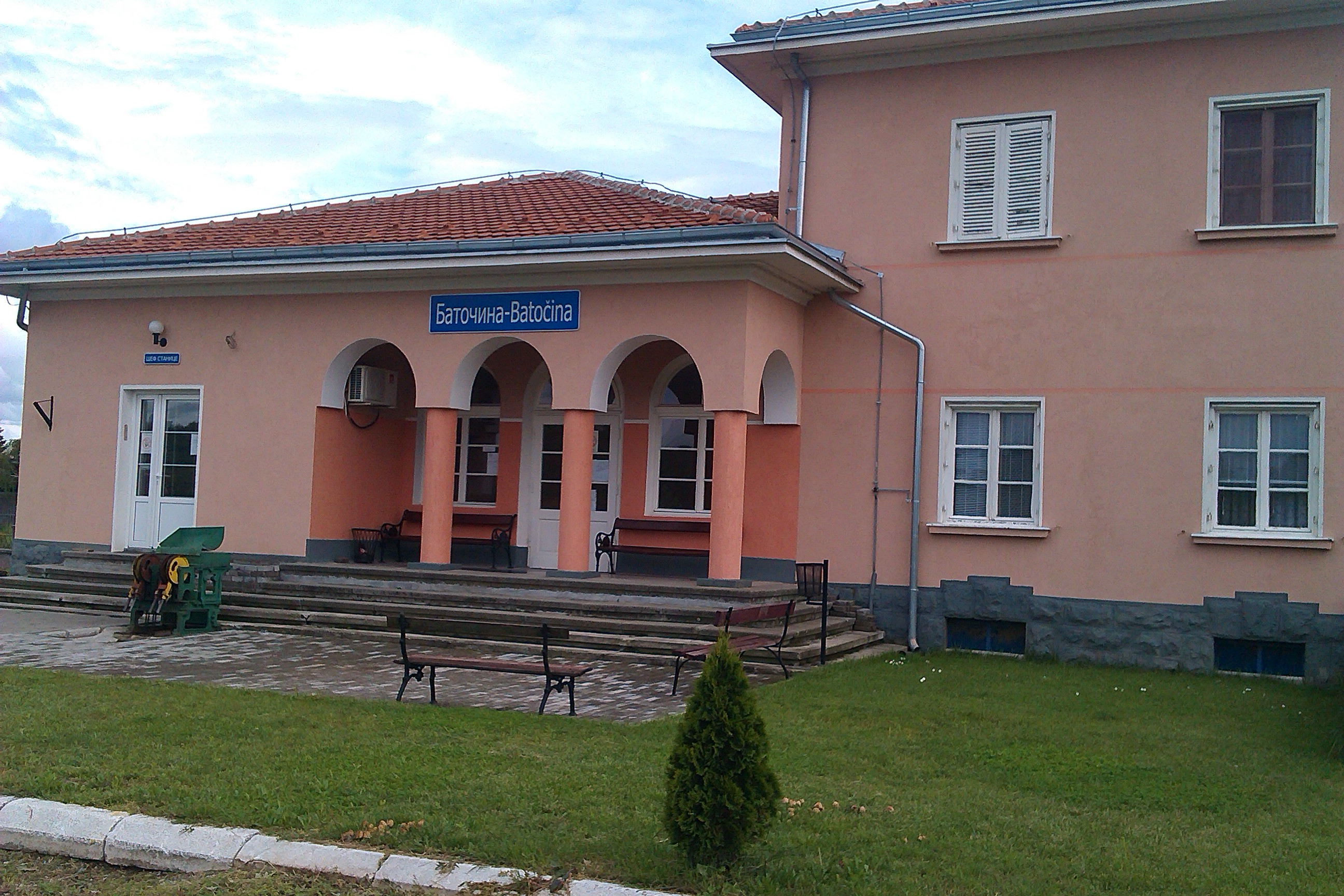 Srpski (latinica): Železnička stanica u Batočini